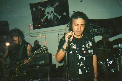 Desobediencia Civil, banda mexicana de Anarco Punk